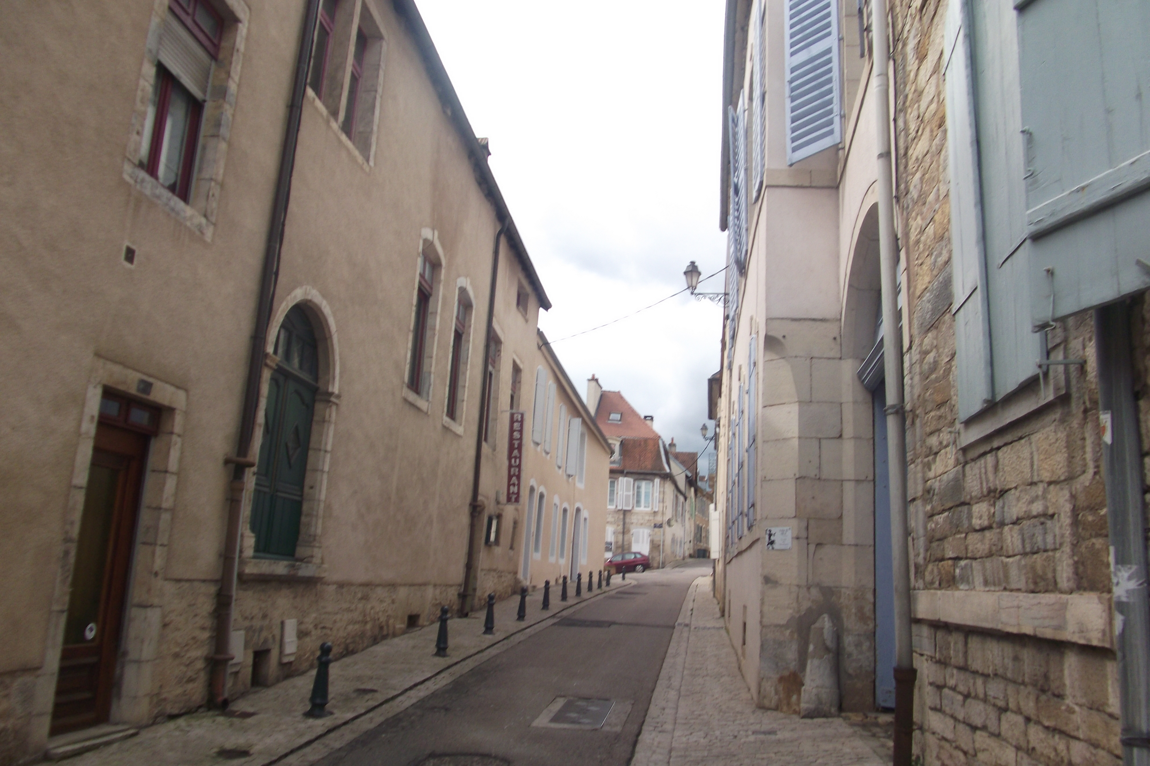 La rue de Mailly dans le centre-ville de Vesoul (Haute-Saône, Franche-Comté)